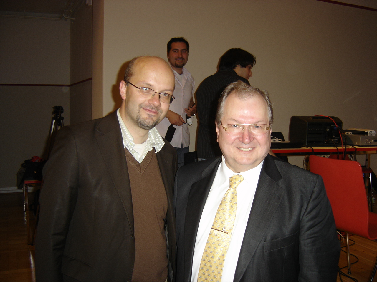 Dr. Fritz Felgentreu (links) und Heinz Buschkowsky (rechts) am 11. Mai 2009 in Berlin-Neukölln